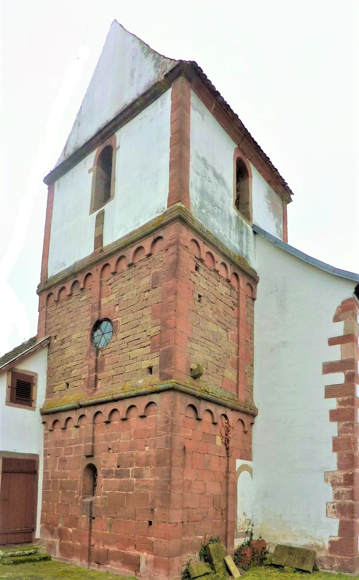 Église Saint-Pierre et Saint-Paul de Thal-Marmoutier